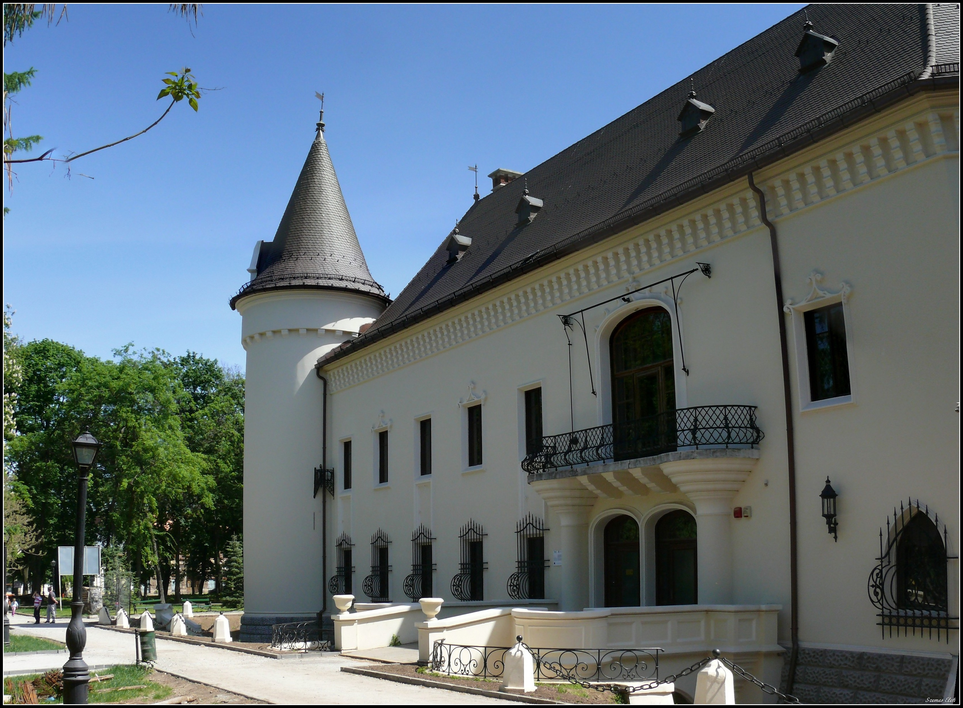 Centru, Carei 445100, Romania